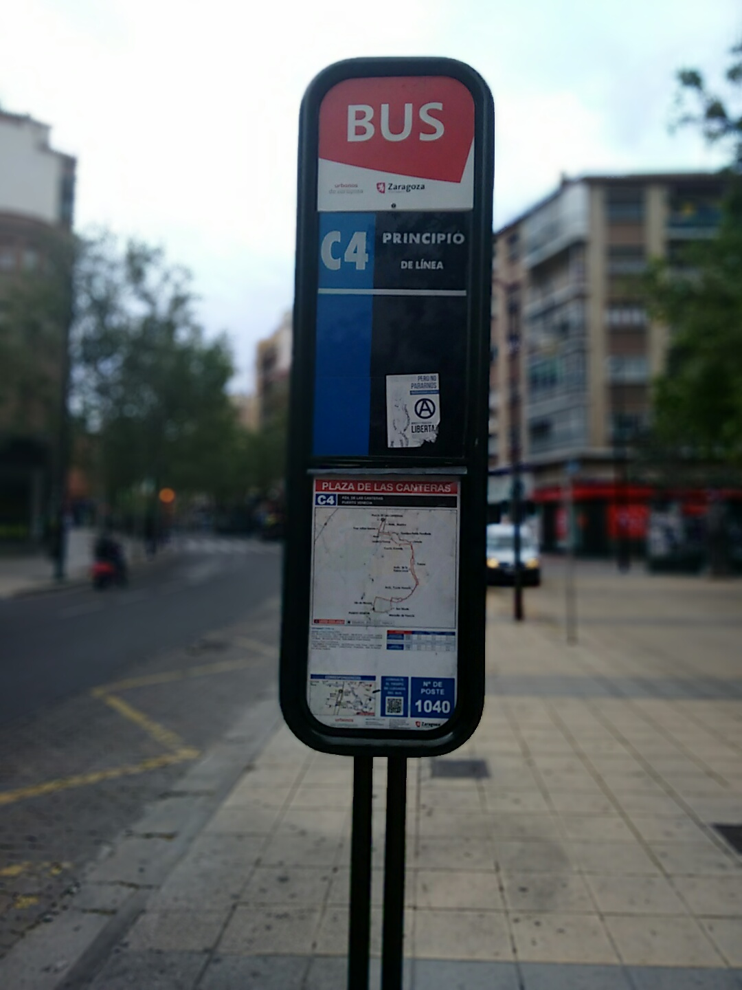 Final de la línea C4 de los Autobuses Urbanos de Zaragoza, en la Plaza de las Canteras.